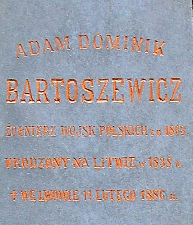 Galicijos knygų leidėjo Adomo Dominyko Bartuševičiaus antkapio Lvovo Lyčiakovo kapinių 1863 m. sukilėlių kalnelyje fragmentas